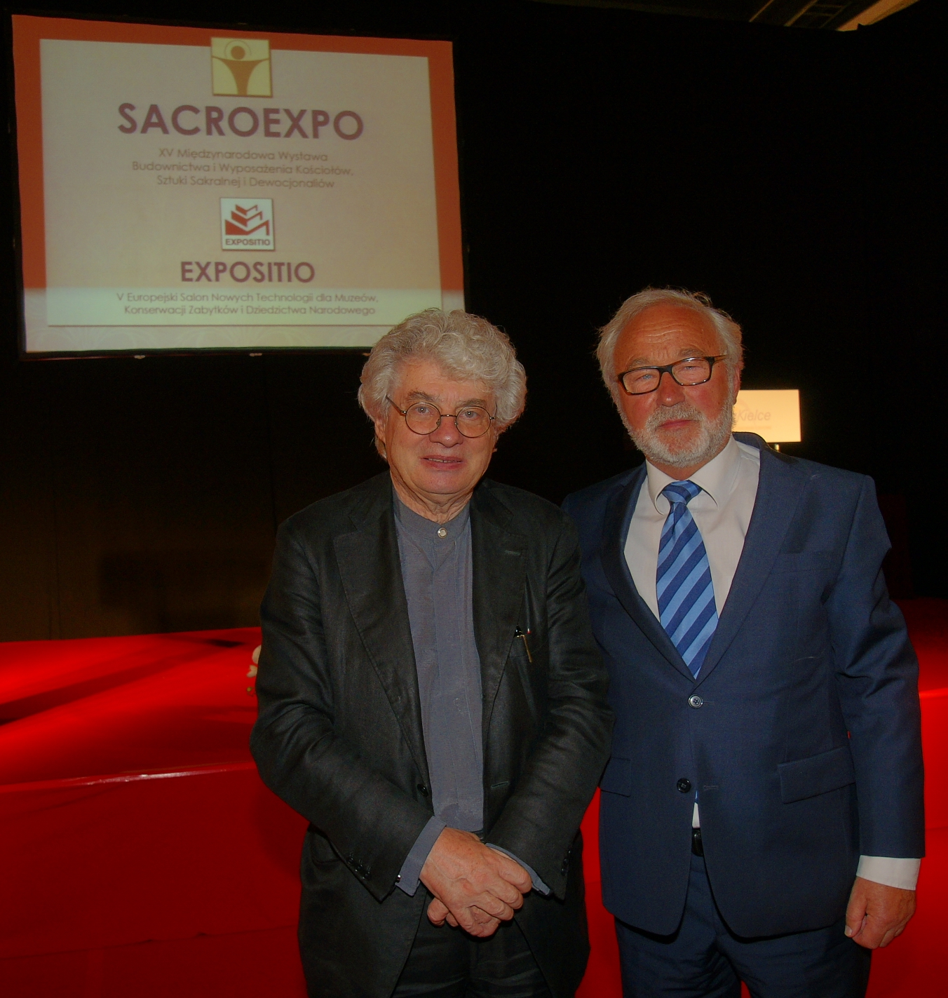 Laureaci medalu Per Artem Ad Deum 2014 - od lewej: Mario Botta oraz Adam Bujak